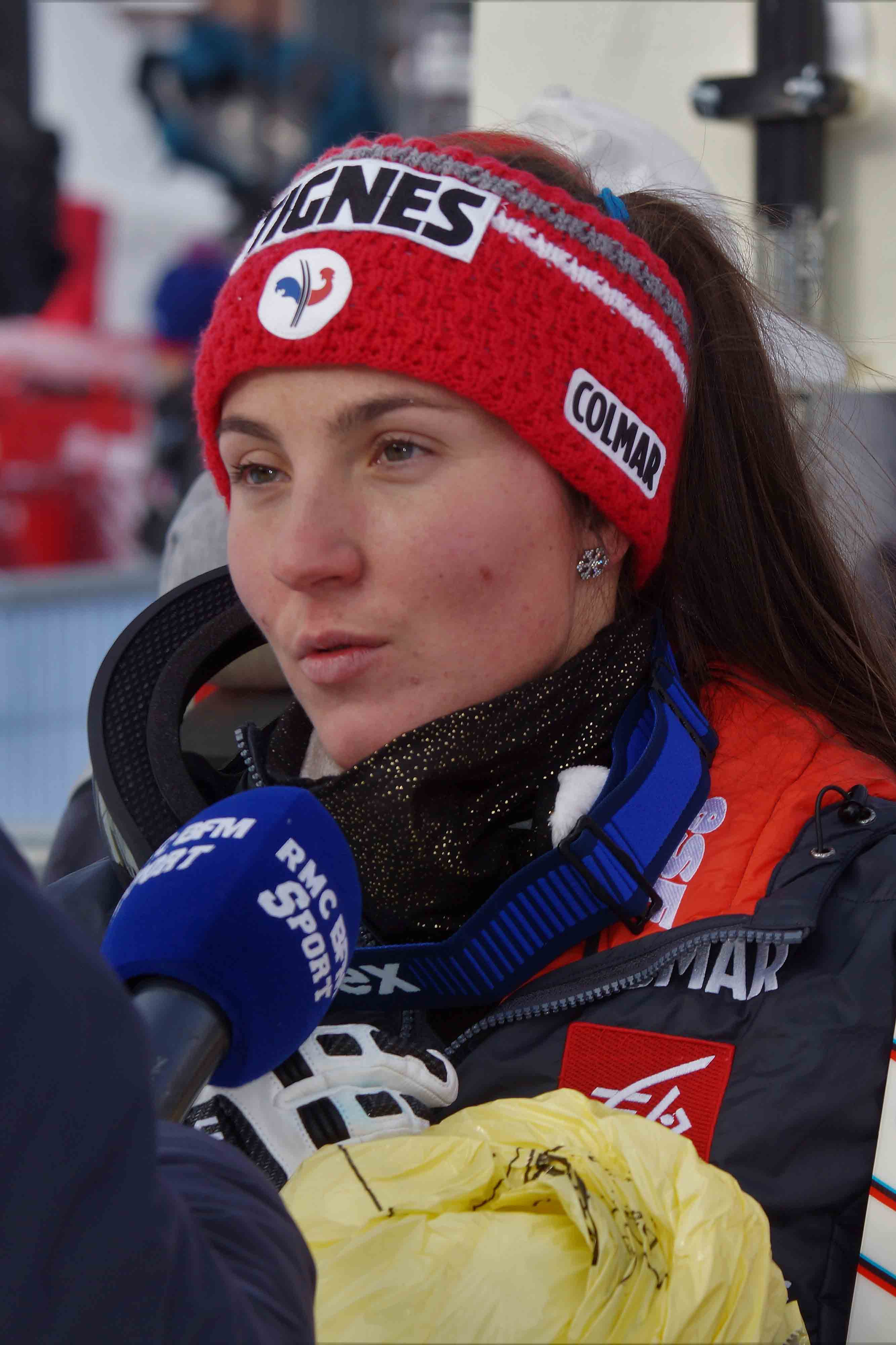 Tiffany Gauthier lors du AUDI FIS SKI WORLD CUP SUPER G VAL D'ISERE 2017